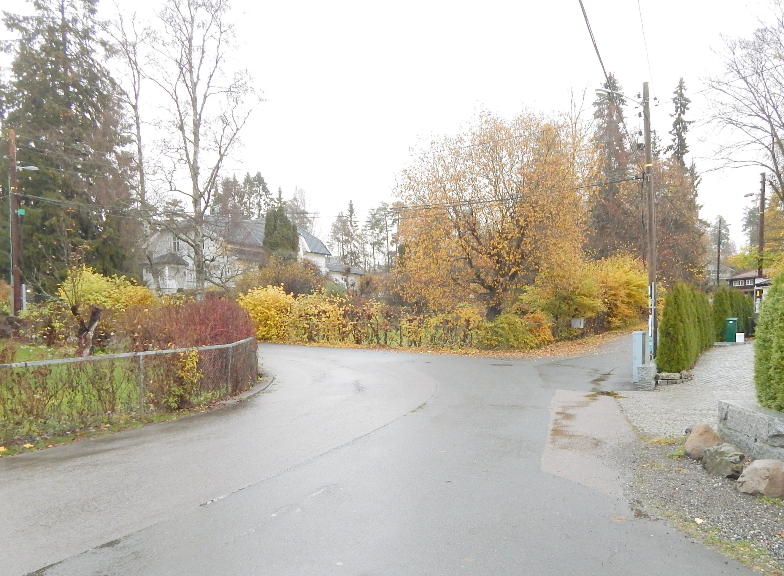 Tennisveien